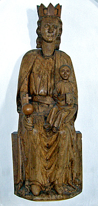 Madonnafigur fra o. 1300 - Skivholme Kirke, Framlev Herred - Århus Amt, Denmark.